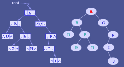 二叉树